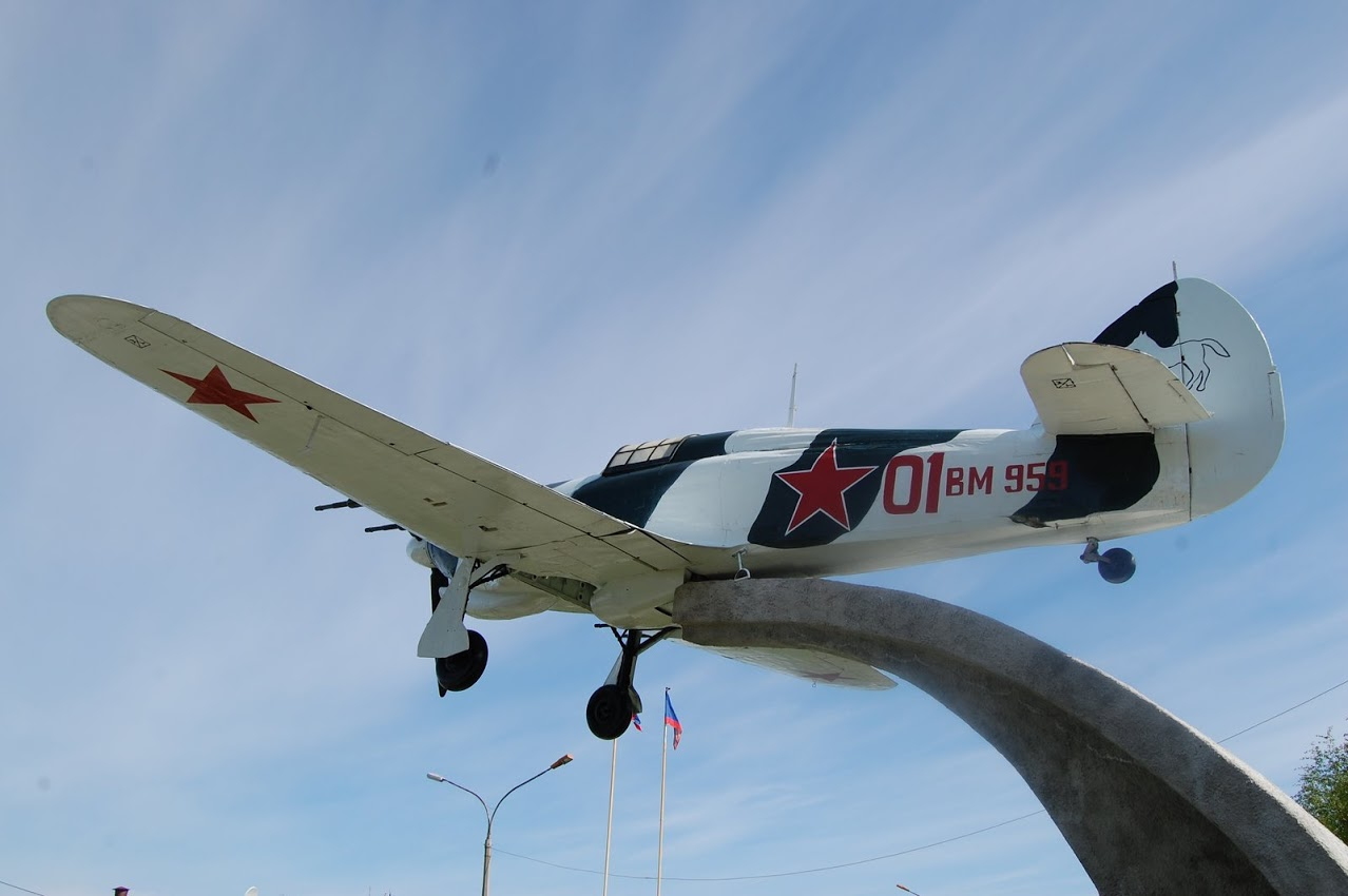 модель самолета в Ревде